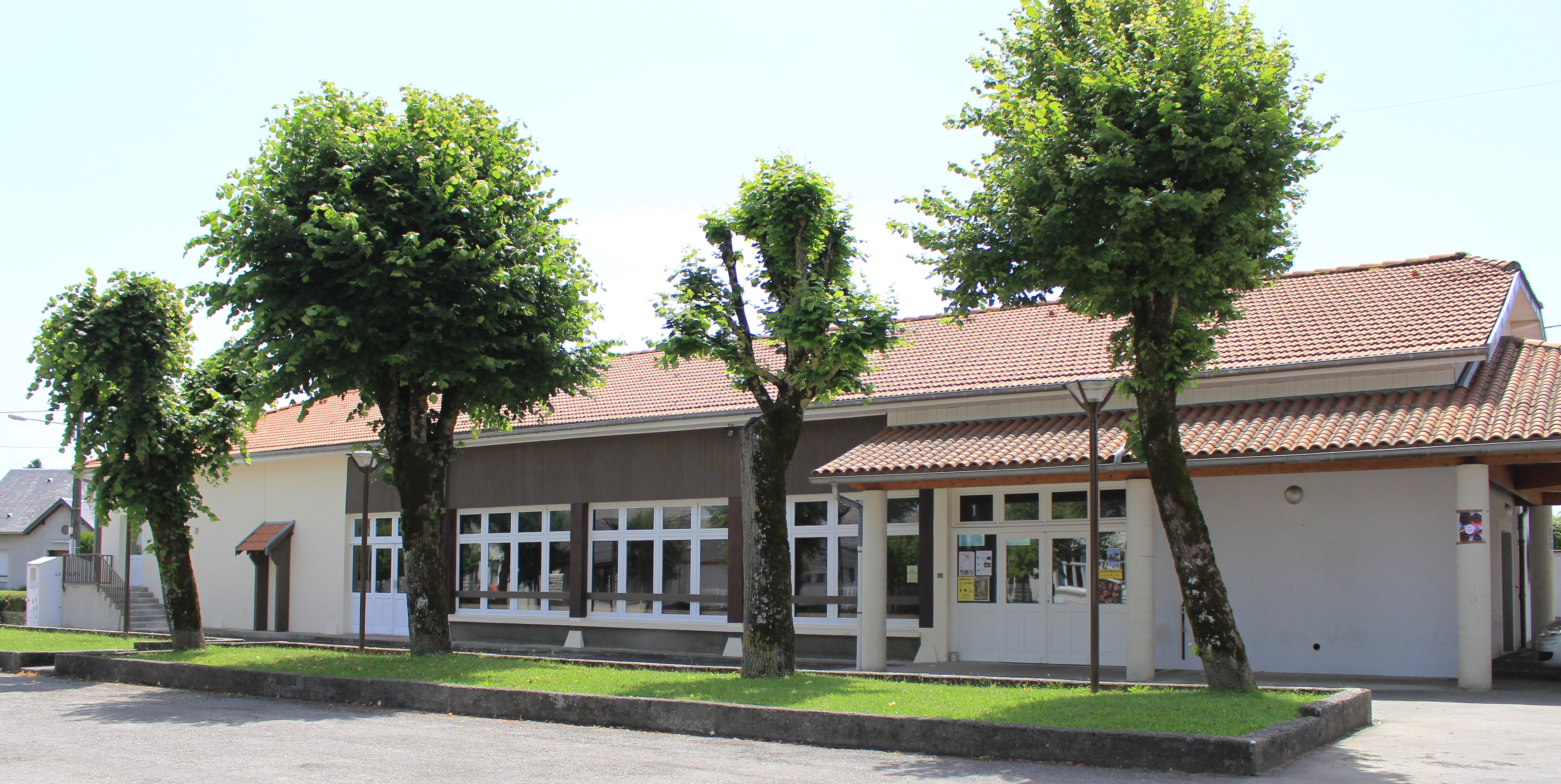 Salle des fêtes de La Barthe-de-Neste (Hautes-Pyrénées)